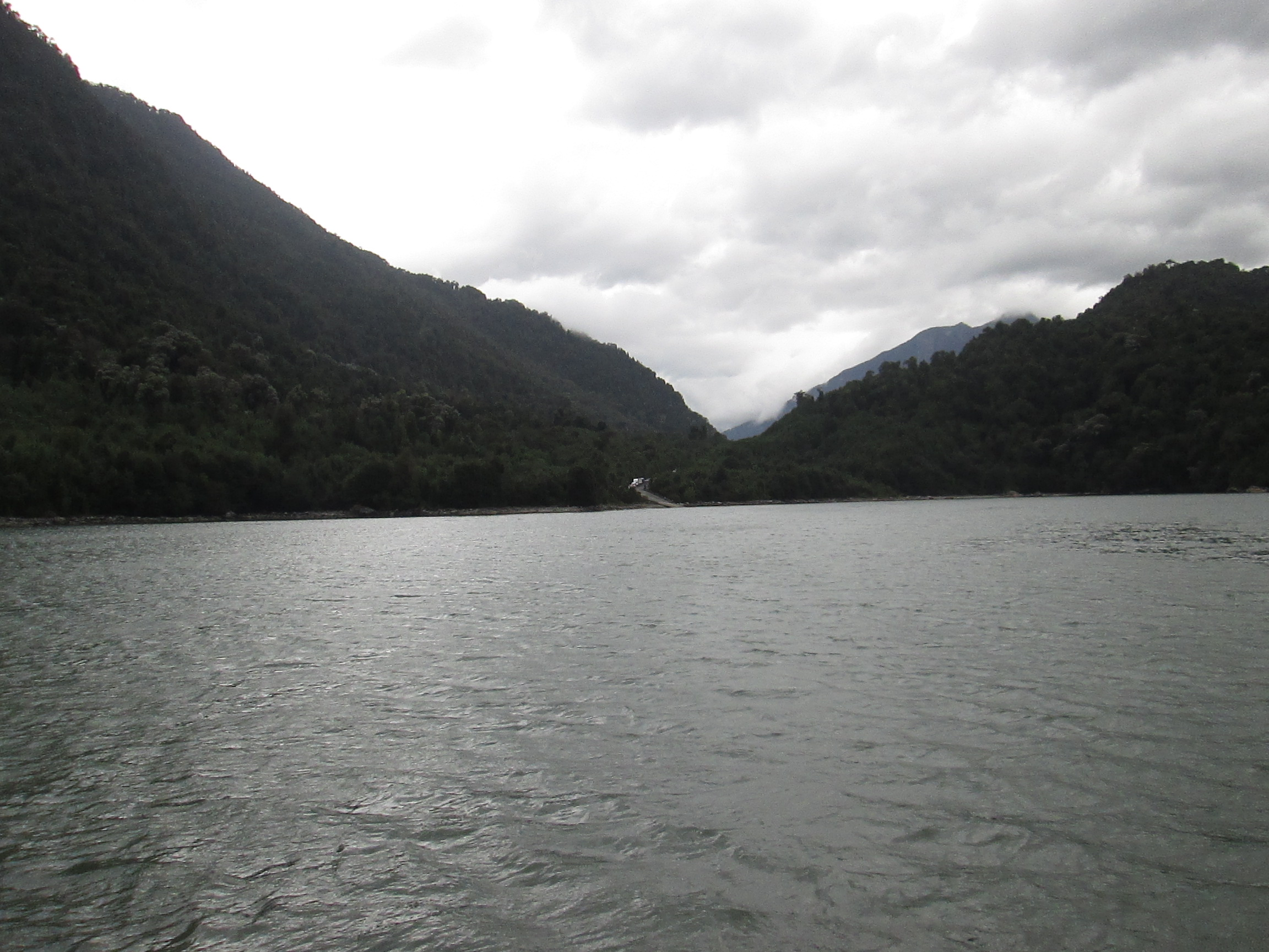 Tramo Caleta Gonzalo - Fiordo Largo en transbordador.